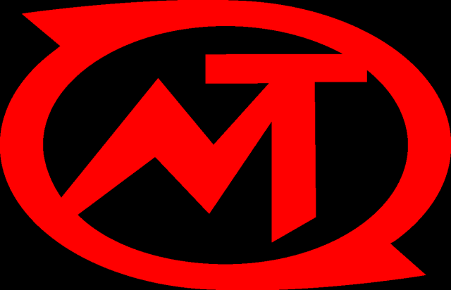 логотип гр. Мумий Тролль